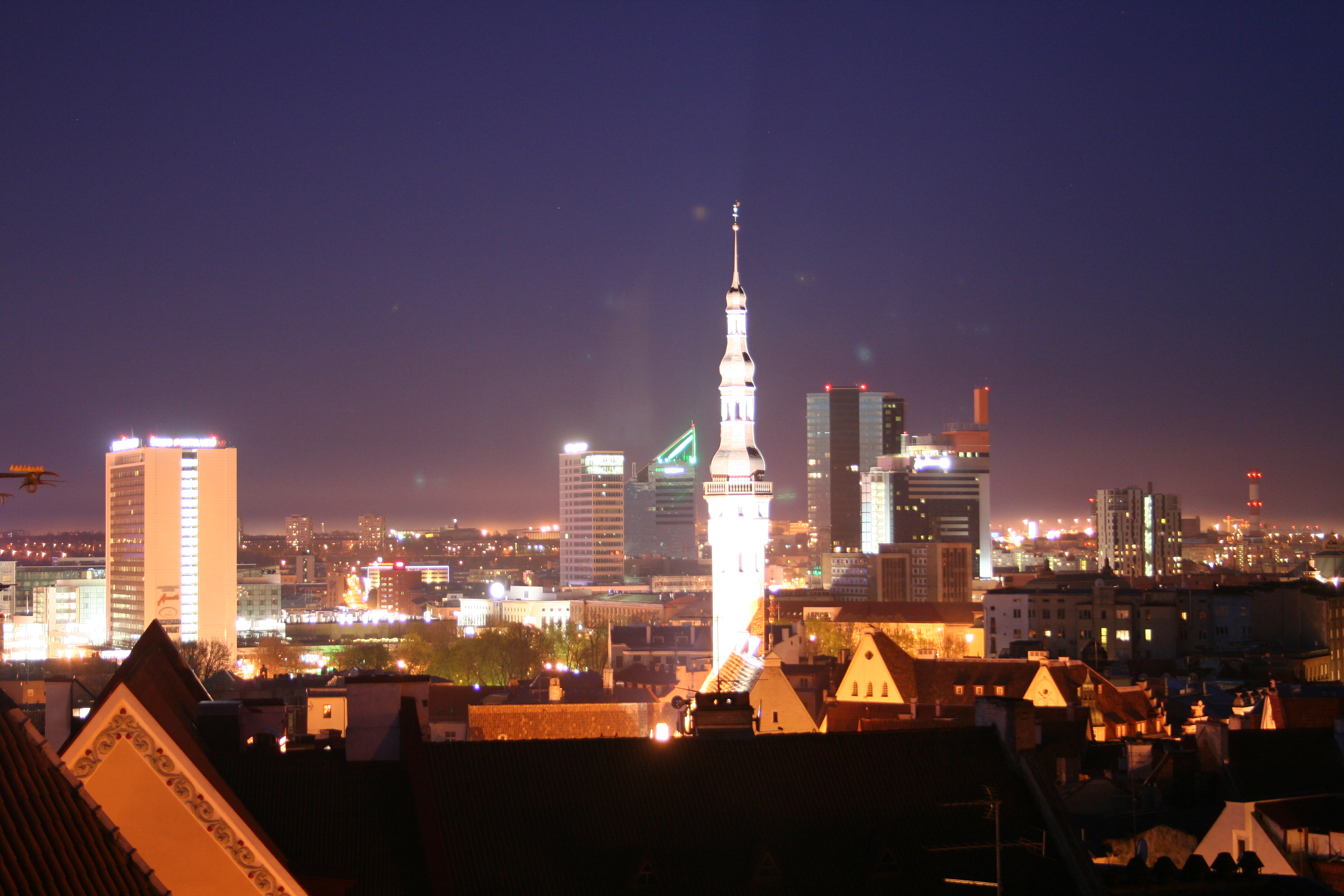 Tallinn: Panorama bei Nacht